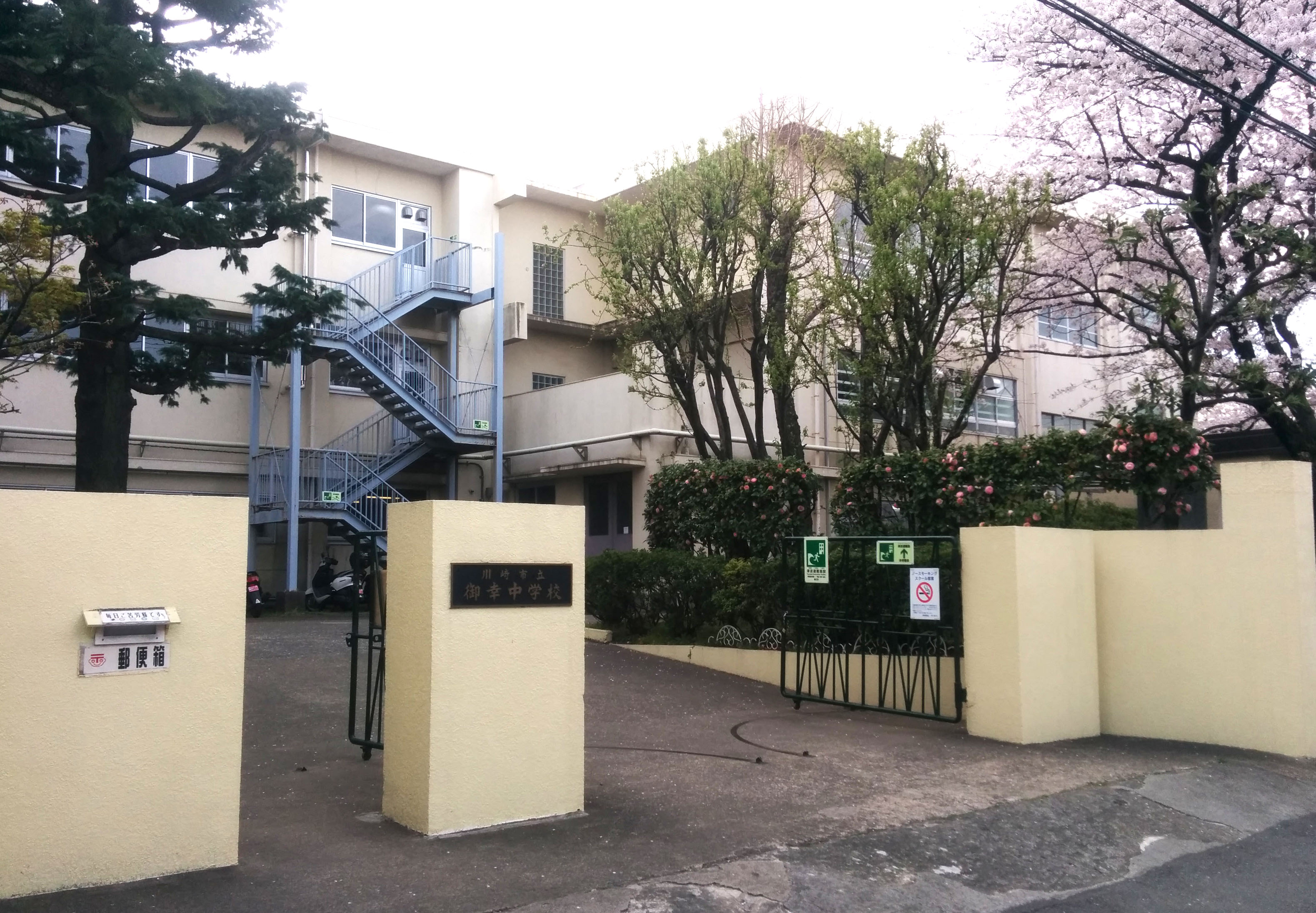 川崎市立御幸中学校正門付近